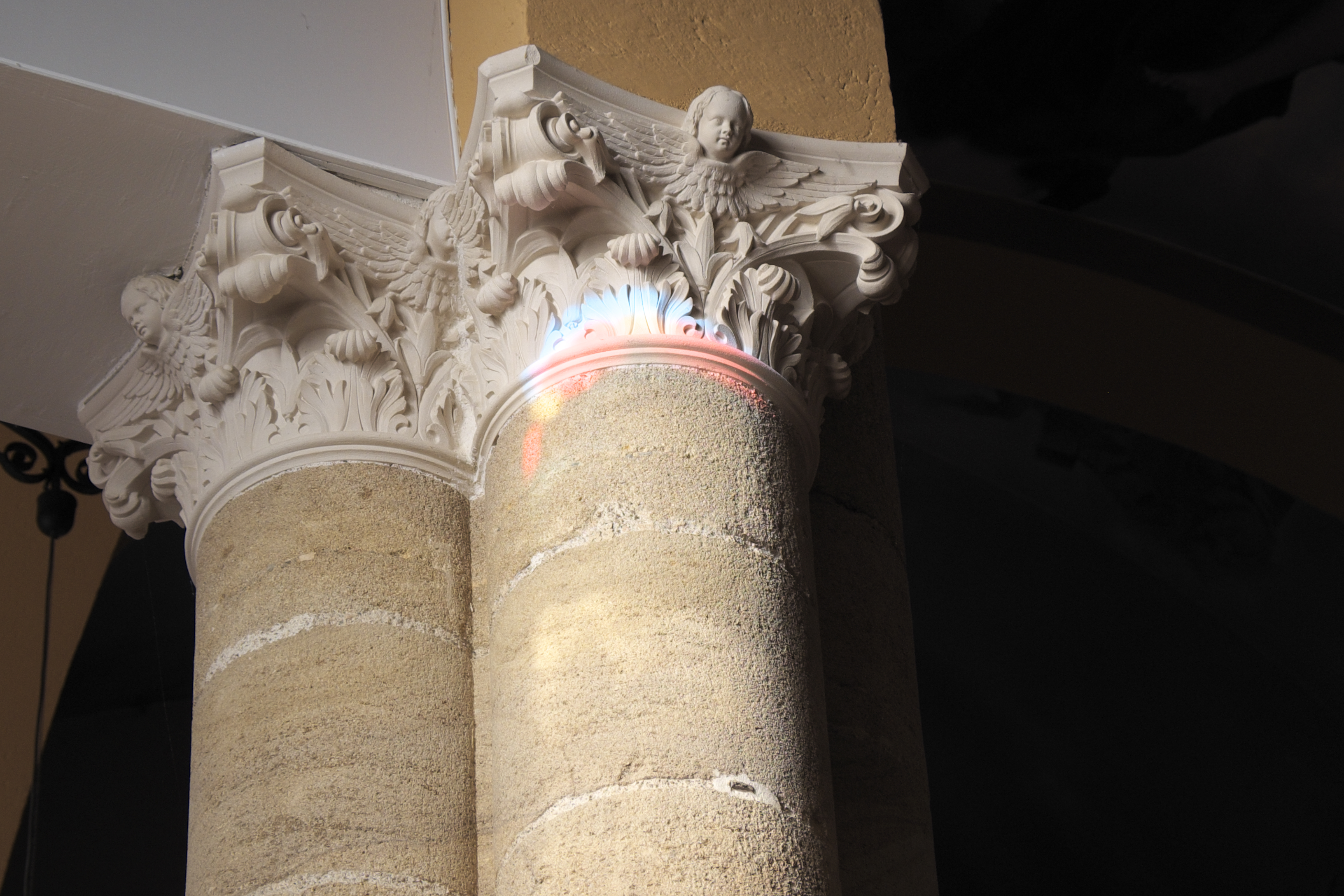 Ehemalige Kapelle Notre-Dame, heute Veranstaltungssaal des Hôtel de Paris, 21 rue de Paris, in Moulins im Département Allier (Auvergne-Rhône-Alpes/Frankreich), Kapitelle